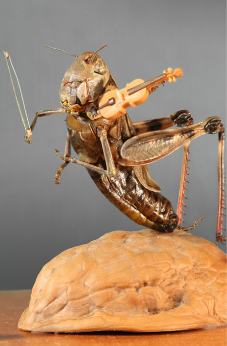 Коненко Станислав Анатольевич